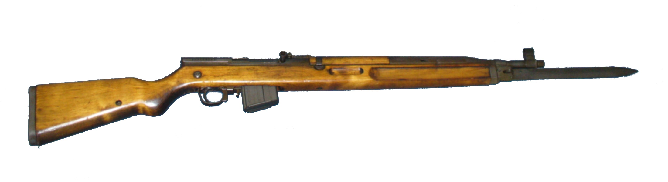 Vz.52, Czech self-loading rifle